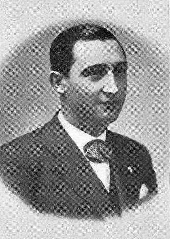 Manuel Moure Gómez, fotografía en Vida Gallega 1932